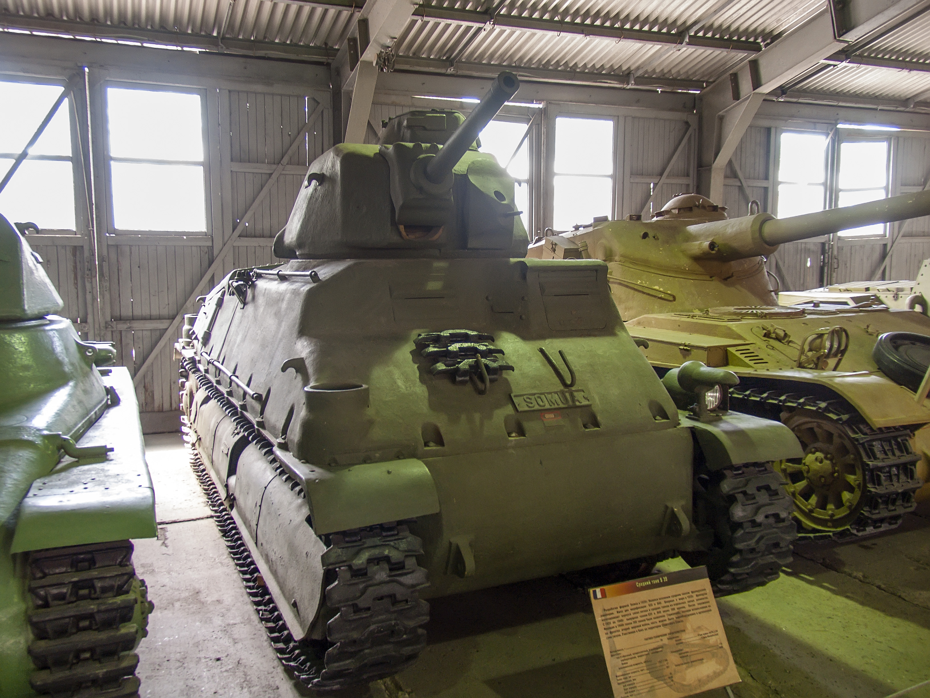 Средний танк S 35 в Центральном музее бронетанкового вооружения и техники в Кубинке.